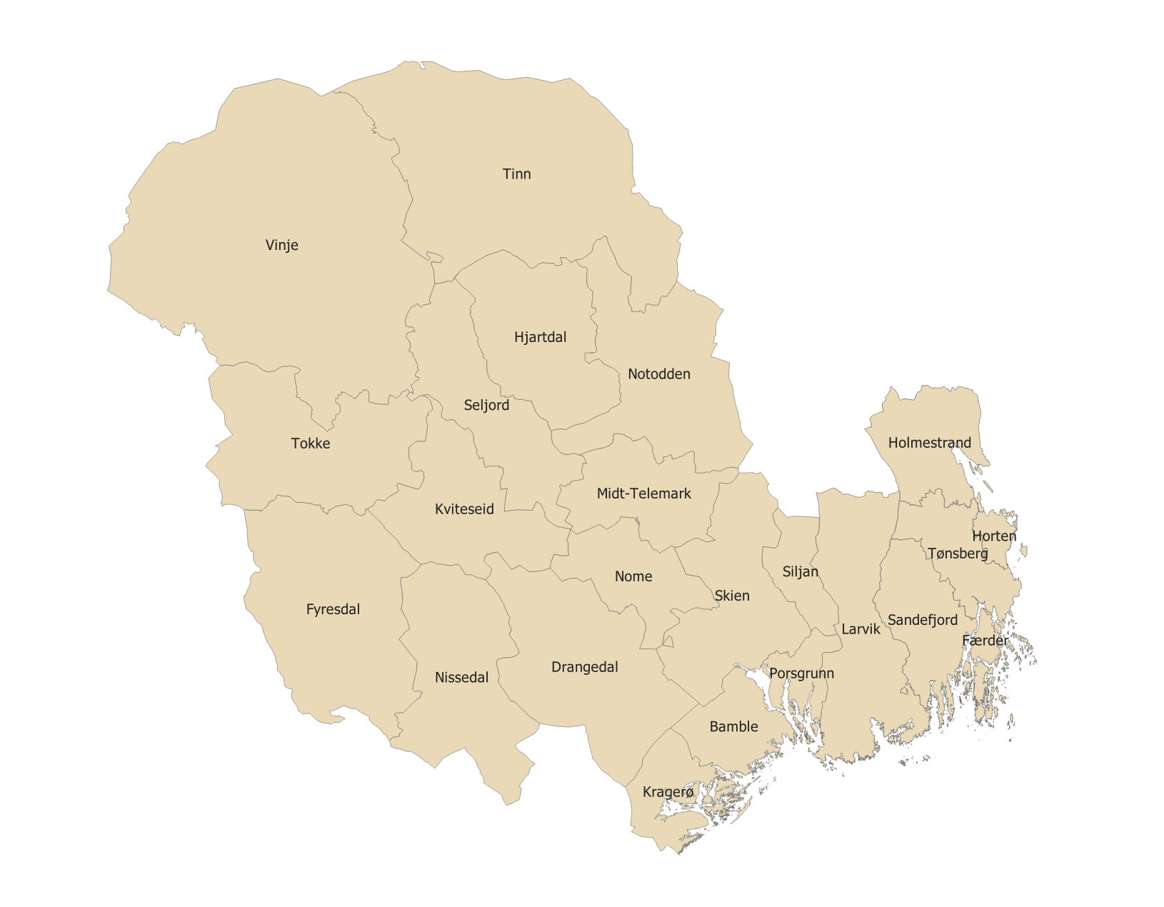 Kart over Vestfold og Telemark fylke med kommuneinndelingen som gjelder fra 2020